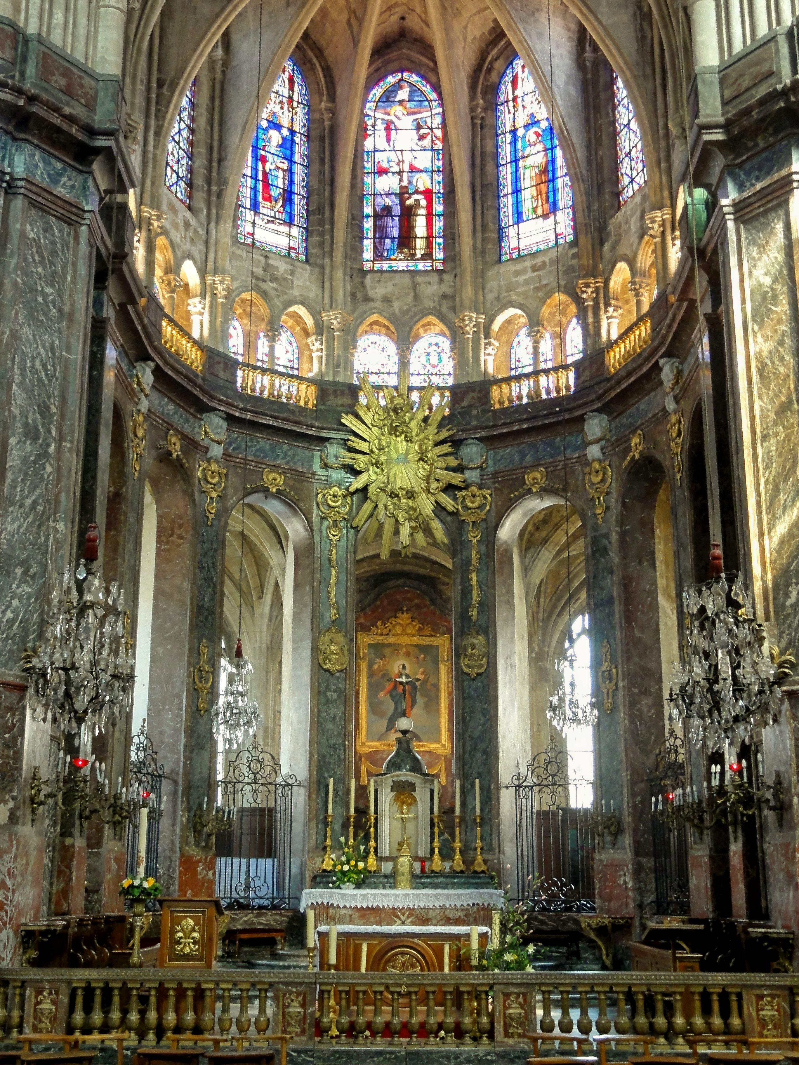 Sanctuaire.